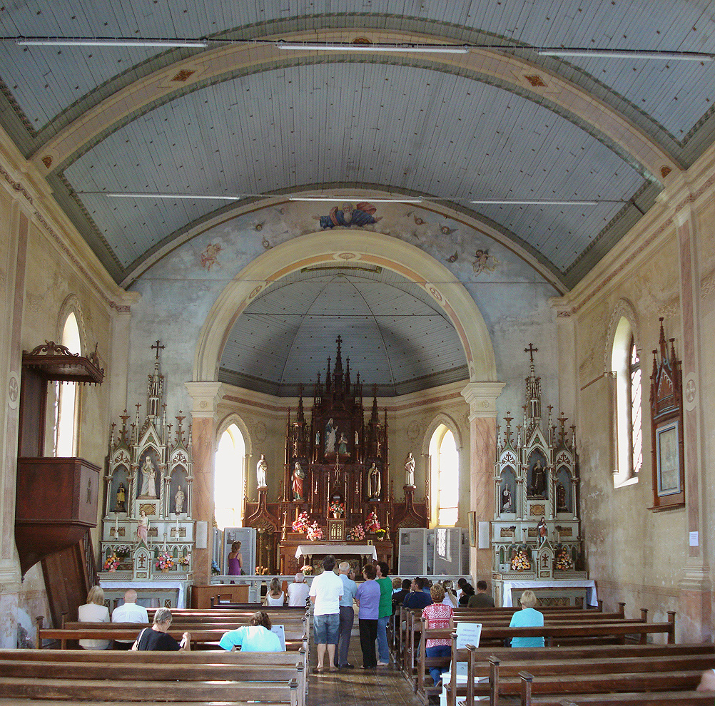 Interior da antiga Matriz de Caravaggio, Farroupilha, Brasil